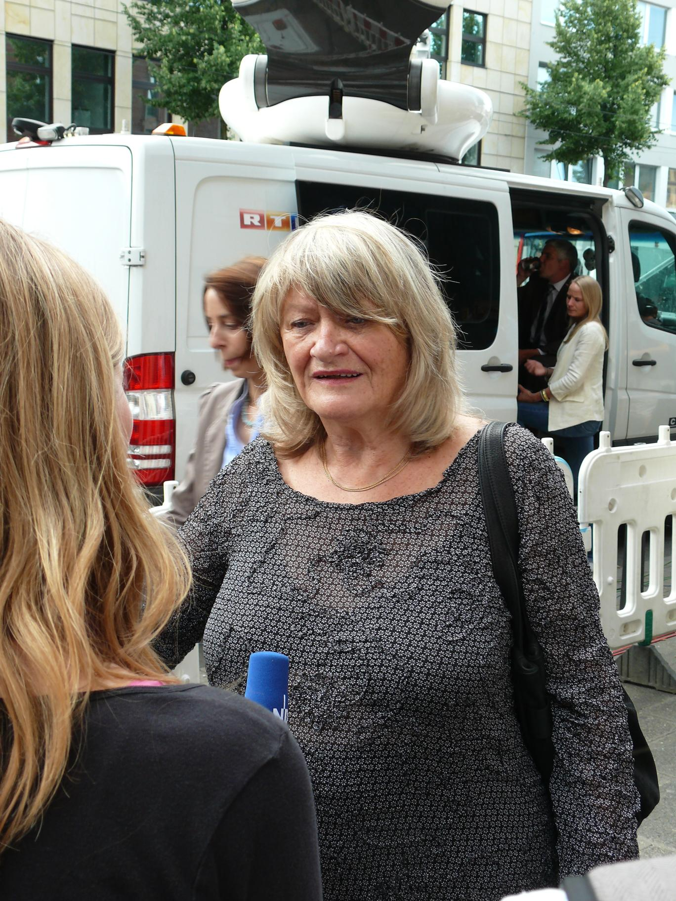 Alice Schwarzer nach dem Urteil im Kachelmannprozess am Landgericht Mannheim